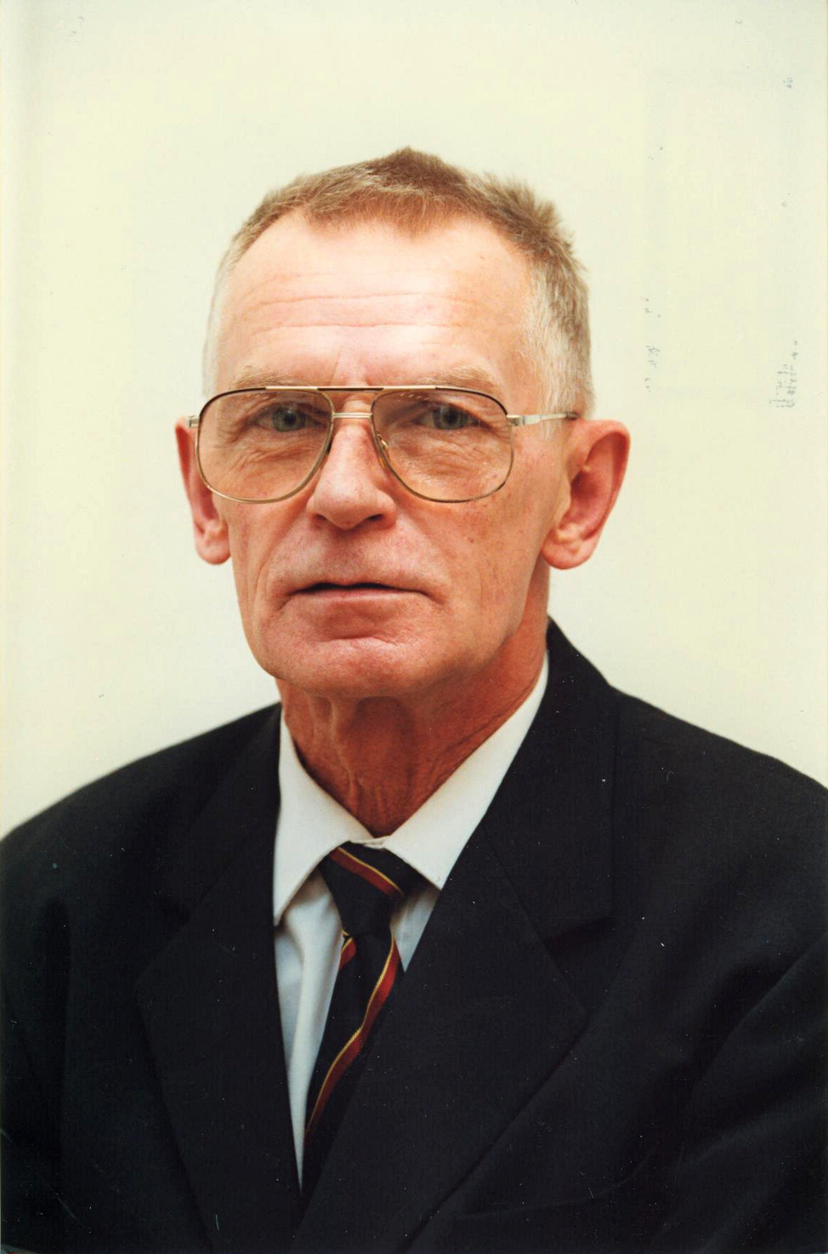 Tiit Käbin. Foto pärineb säilikust VIII Riigikogu 101 liiget.